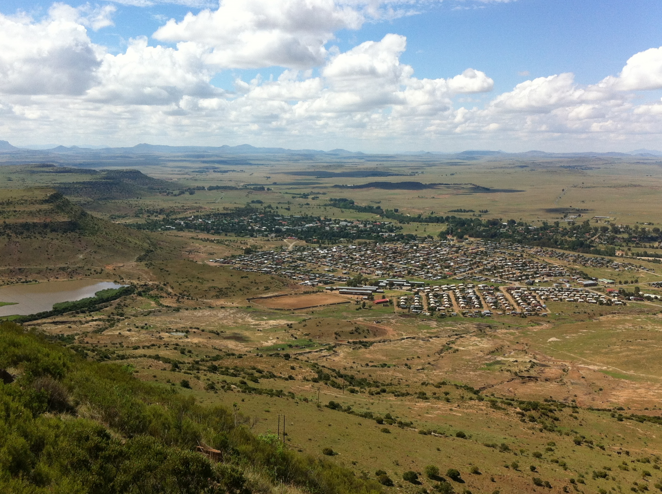 Wepener